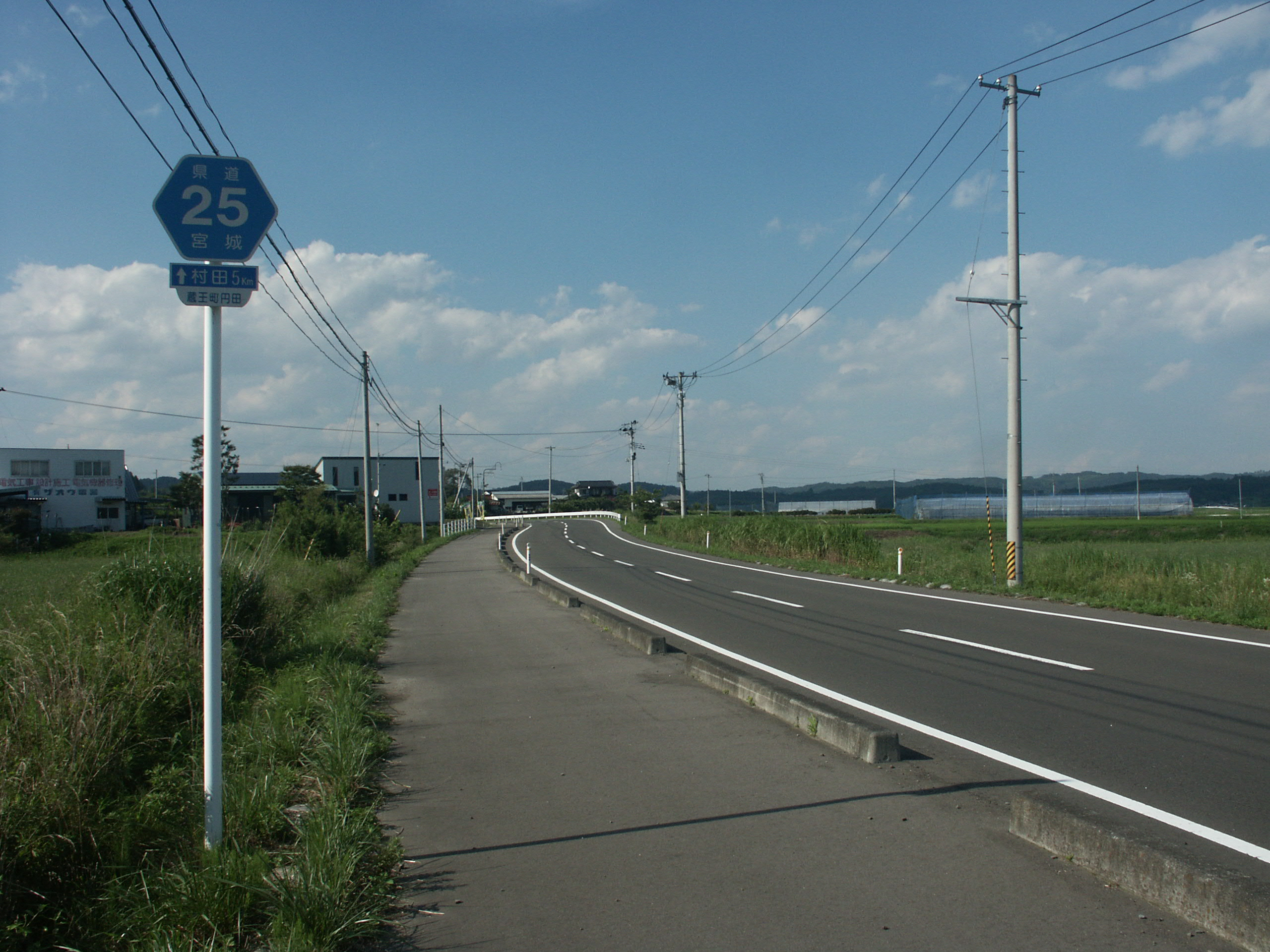 宮城県道25号線蔵王町円田付近